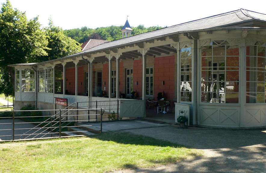 Alte Wandelhalle Bad Rehburg